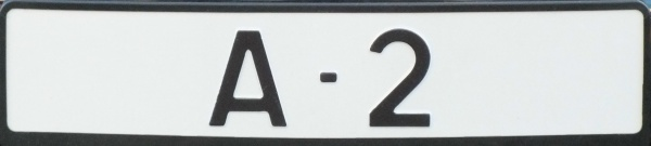 En av Kongens skilt.